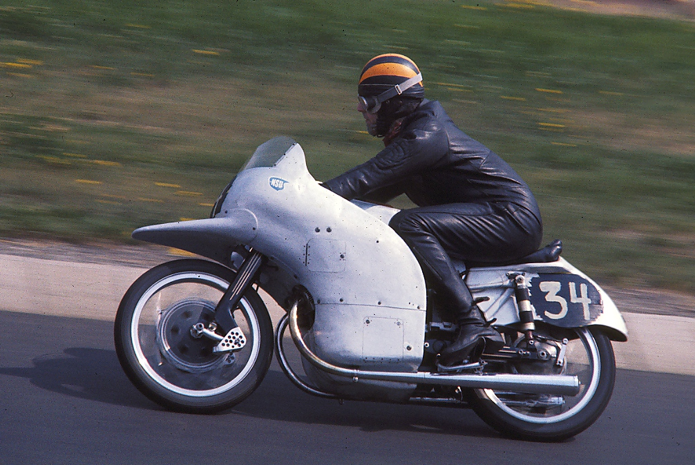 NSU Rennmax, Baujahr 1953, mit Delphin-Verkleidung; Fahrer: Dieter Herz (* 30.04.1940, † 08.04.2004), Sohn des Weltrekordfahrers Wilhelm Herz, beim Oldtimer-Grand-Prix in der Südkehre des Nürburgrings